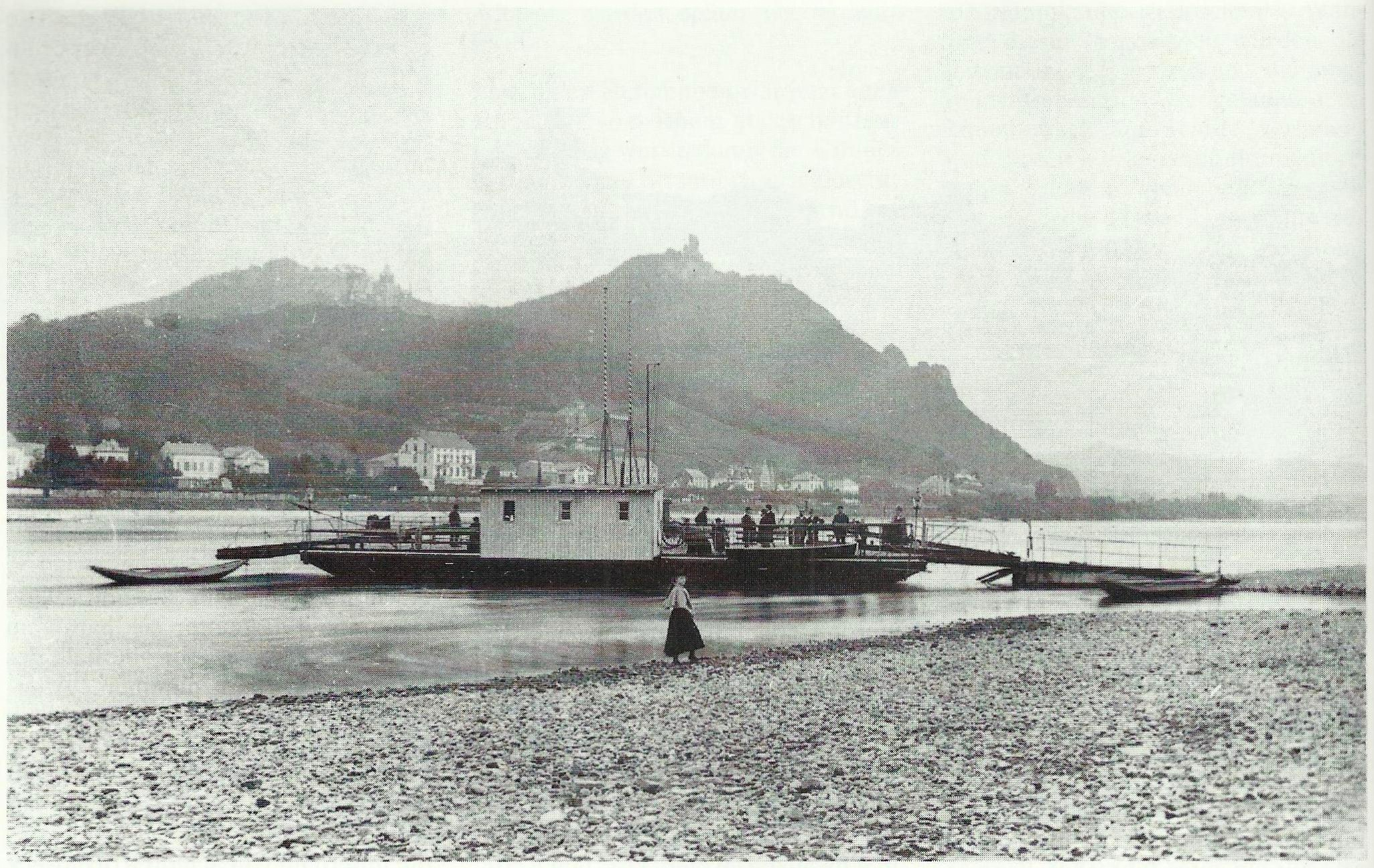 Dritte (hölzerne) Gierseilfähre der Rheinfähre Königswinter–Mehlem, im Hintergrund das Siebengebirge